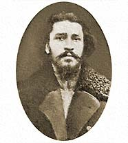 Aleksandr Ivanovic Barannikov (1858-1883)